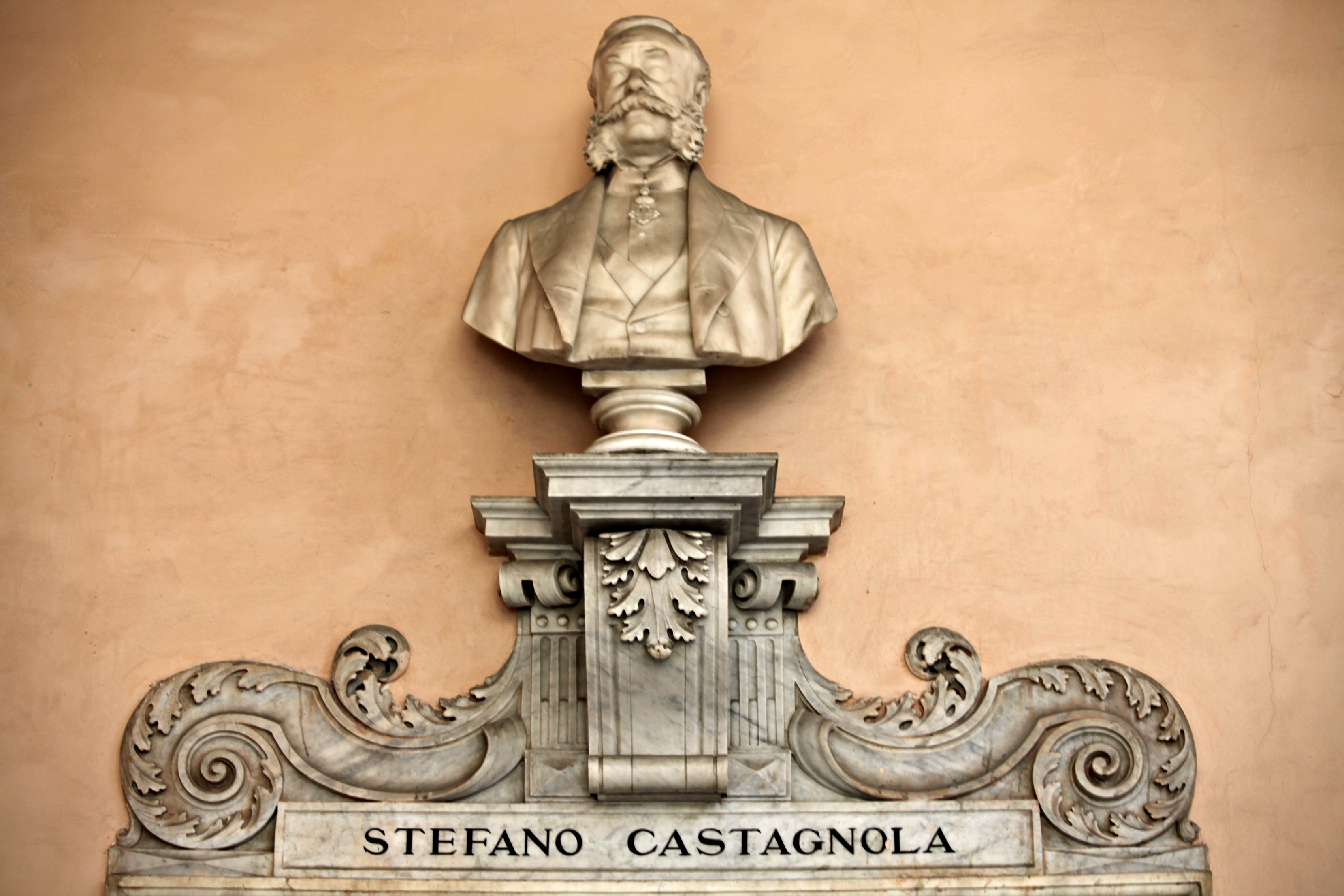 Palazzo Doria-Tursi - Musei di Strada Nuova This is a photo of a monument which is part of cultural heritage of Italy.